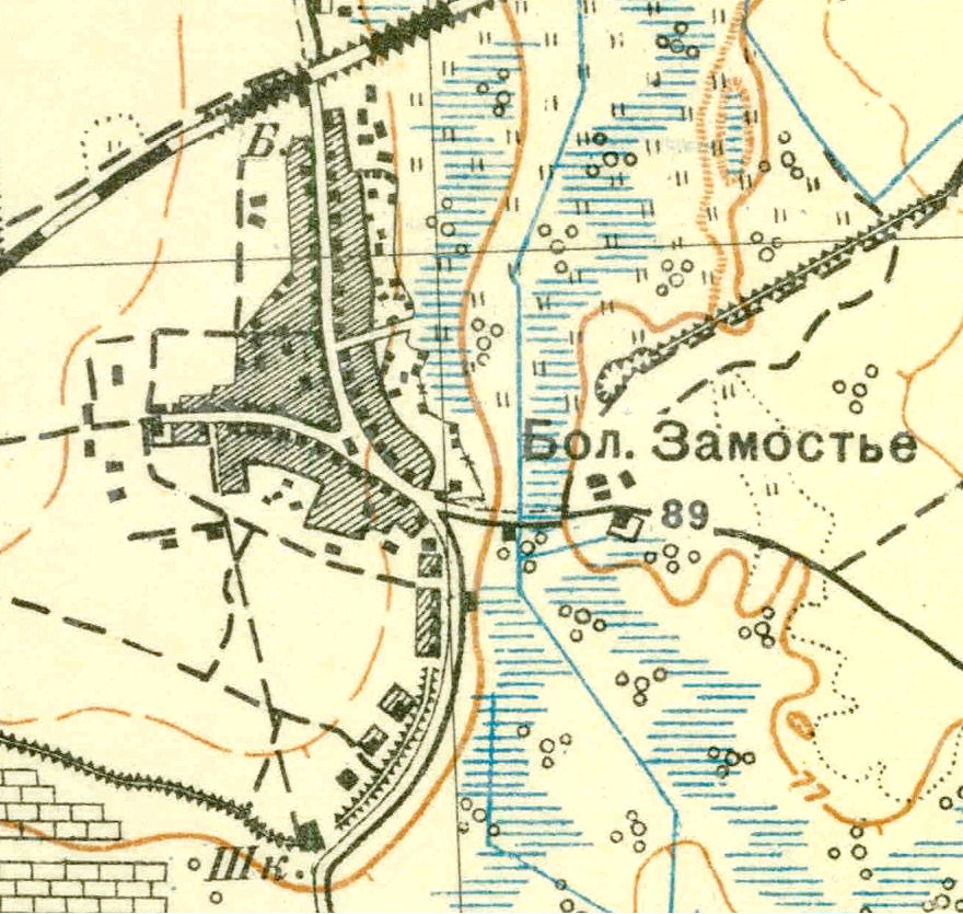 Топографическая карта Ленинградской области, квадрат О-36-13-А-г, деревня Большое Замостье